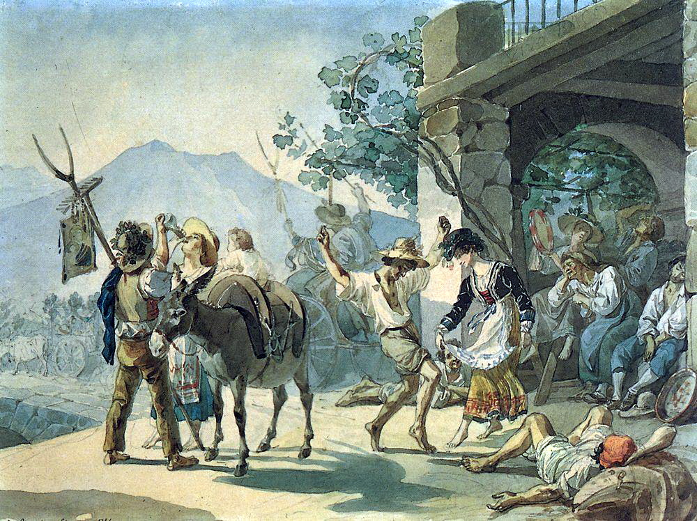 Картина Свято збору врожаю